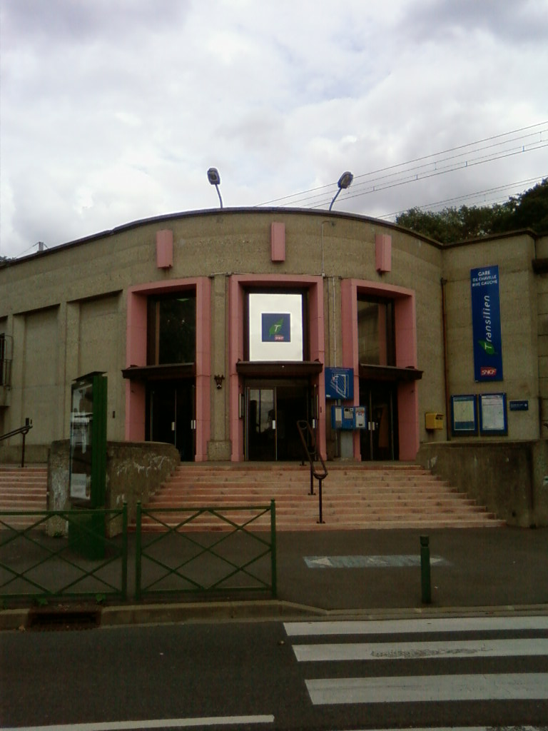 Gare de Chaville-Rive-Gauche (92) : Le bâtiment voyageurs.